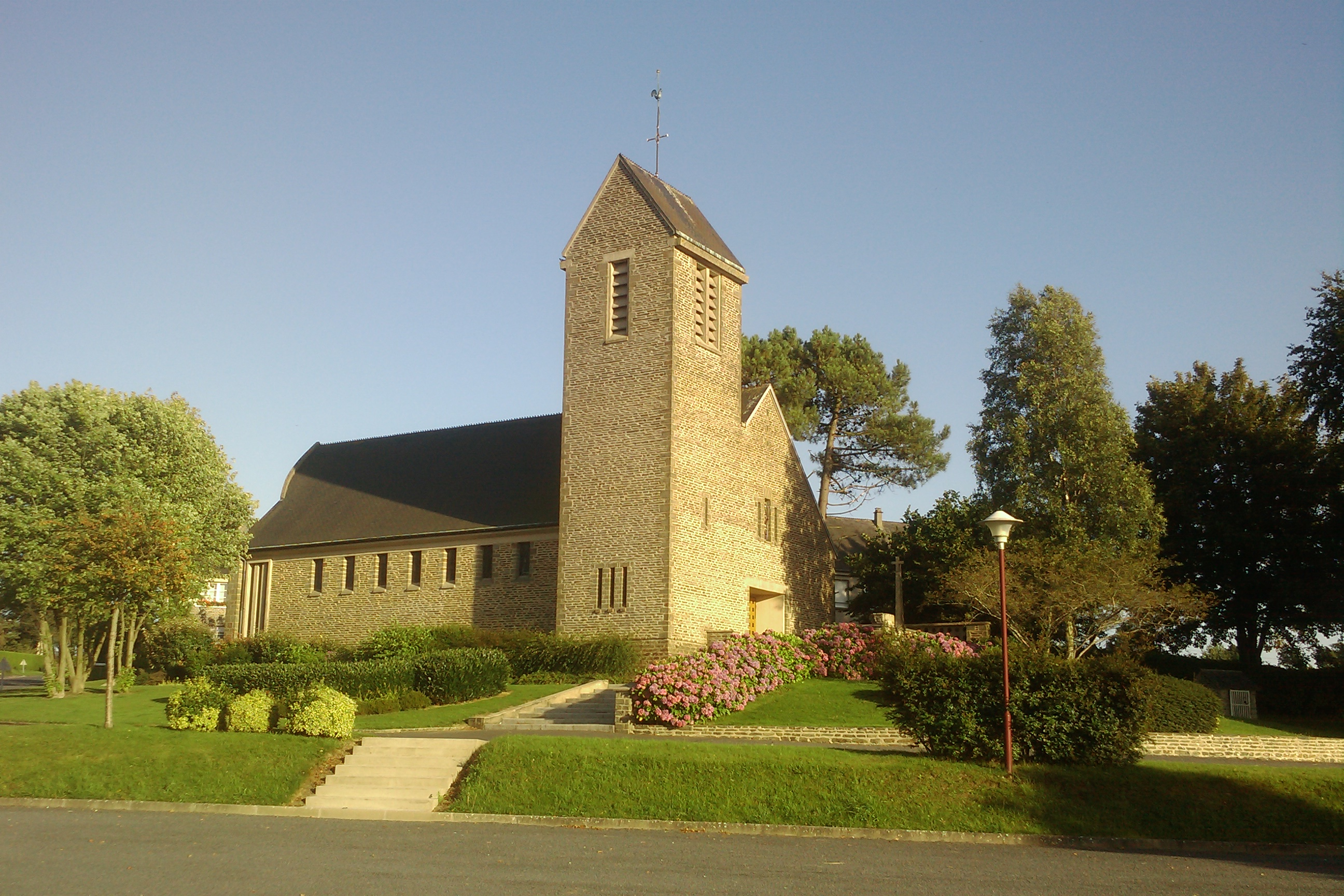 Église de Saint-Germain-d'Elle